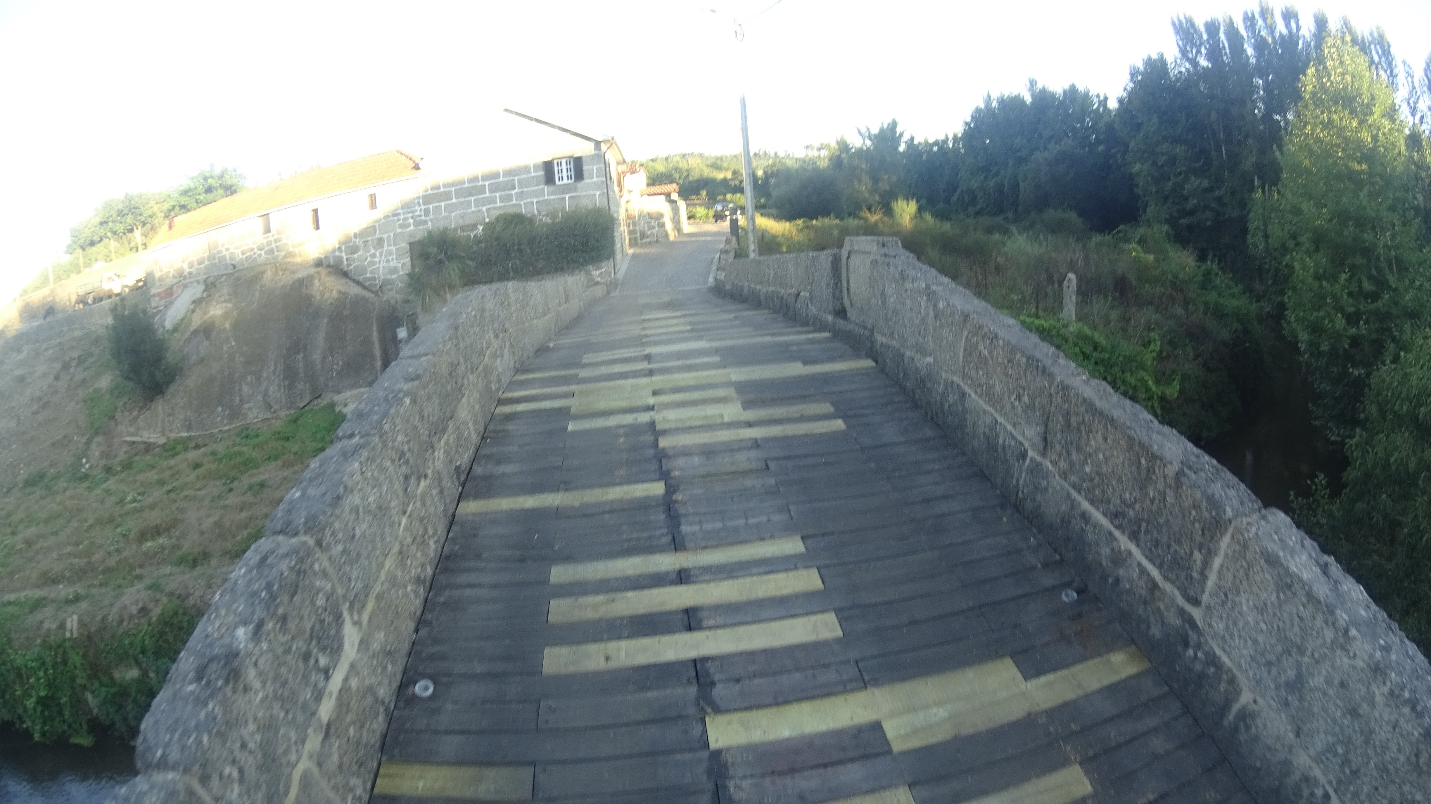 Tabuleiro em madeira